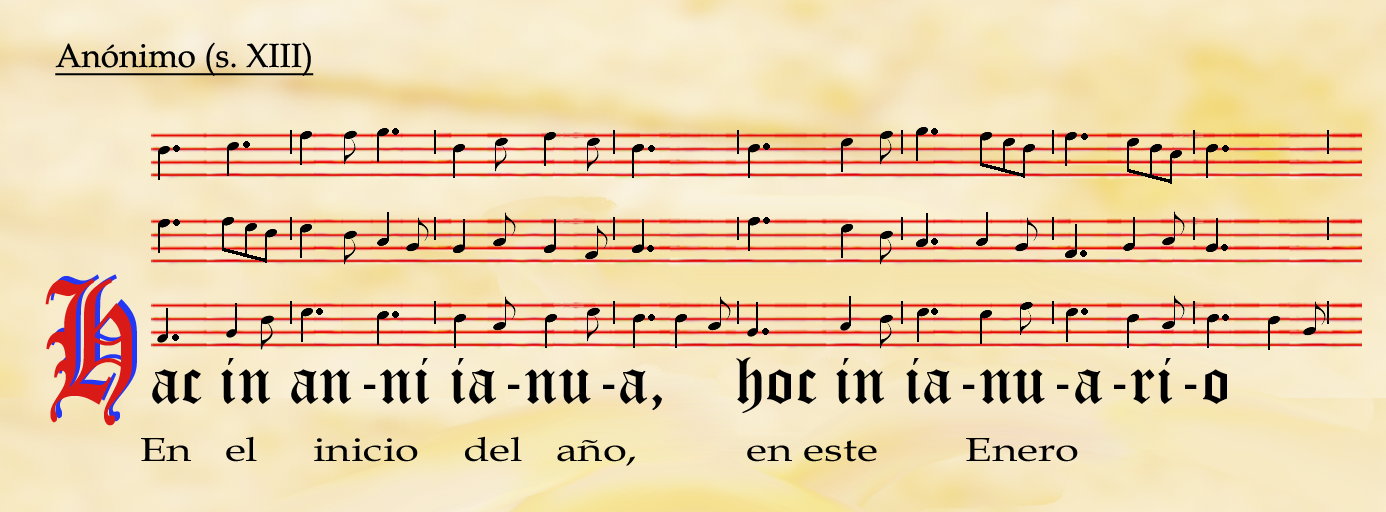 Conductus polifónico a 3 voces: Hac_in_anni_ianua; Autor: Anónimo, (s XIII).